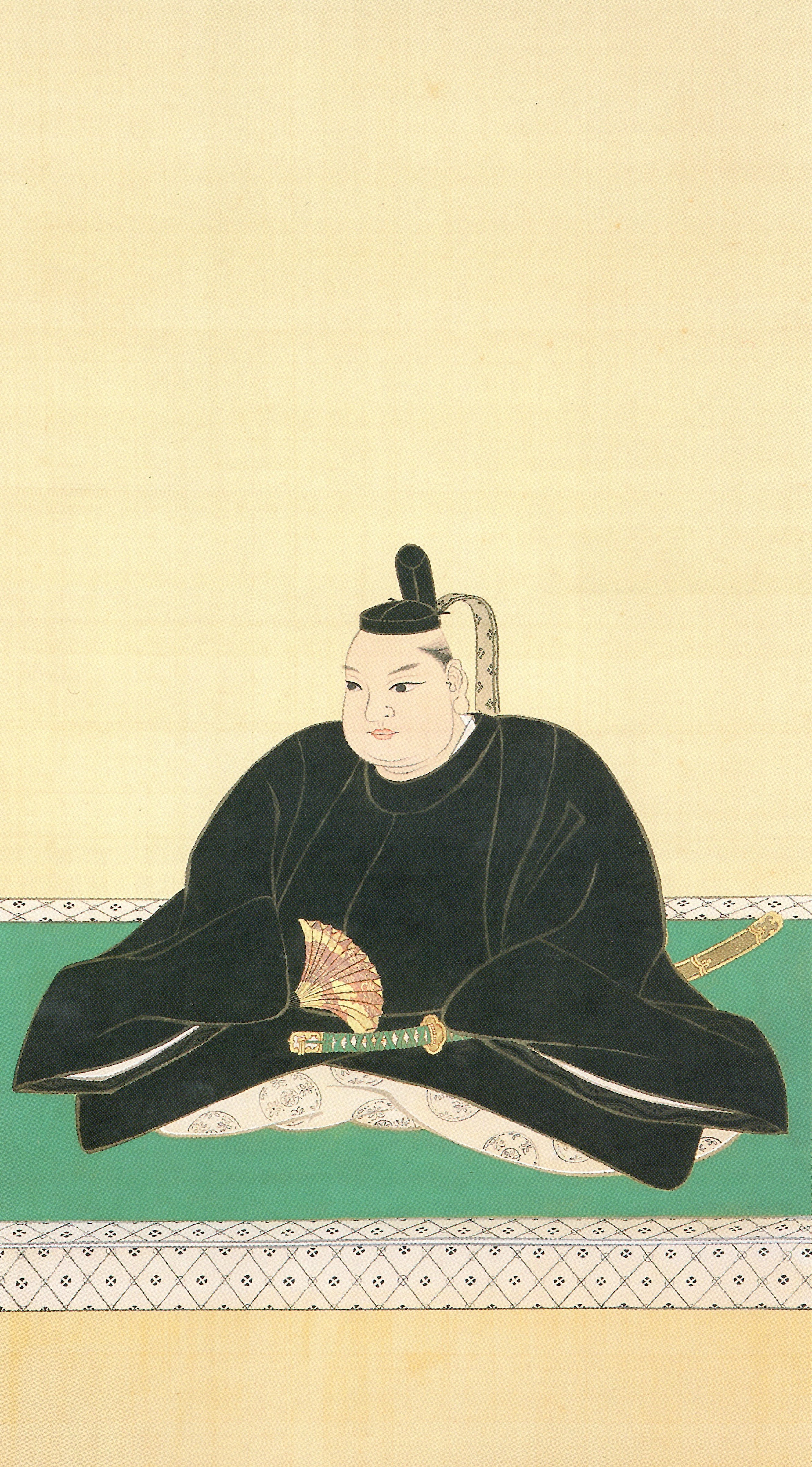 蜂須賀至鎮の肖像。